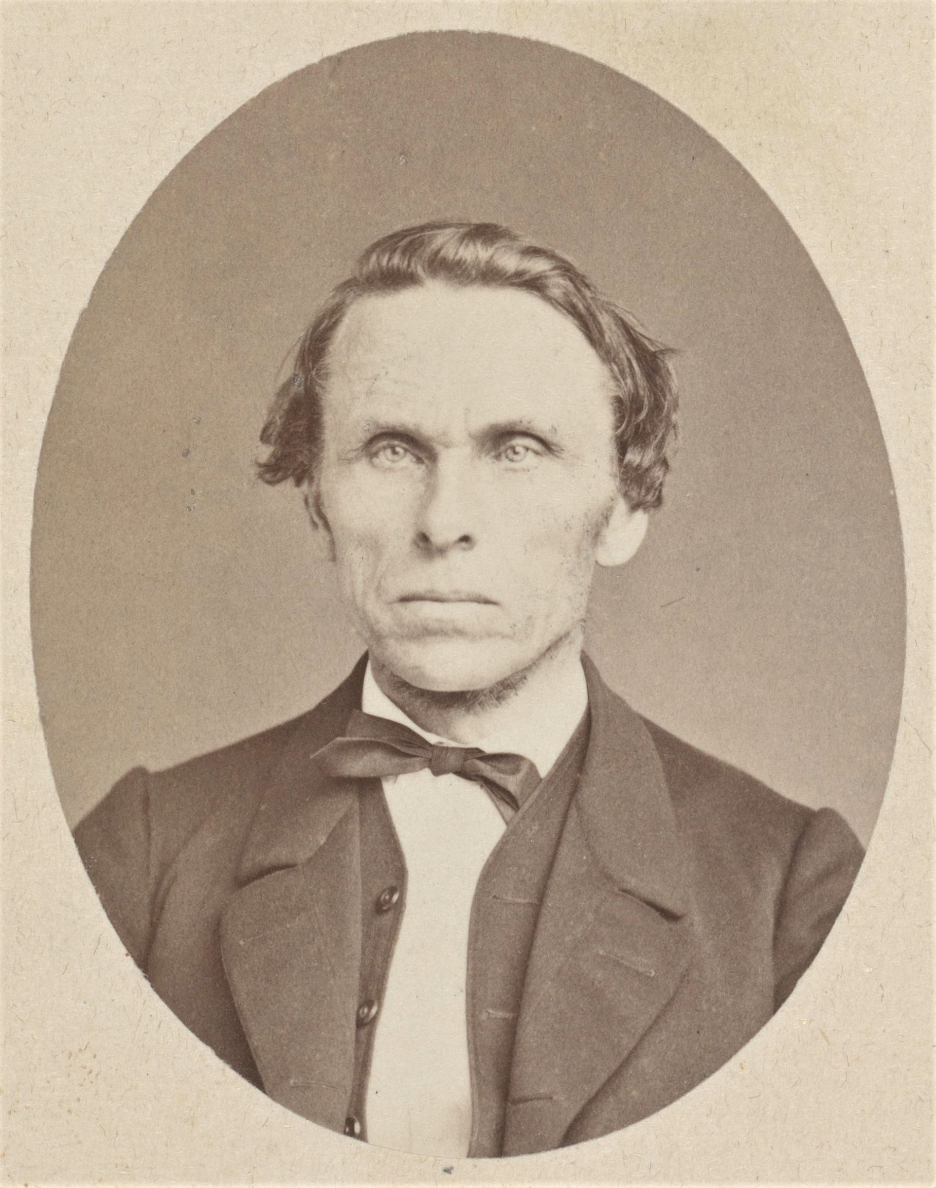 Ole Sivert Mortensen Welde (1820–1883), stortingsmann, gårdbruker, lærer og lensmann i Beitstad.